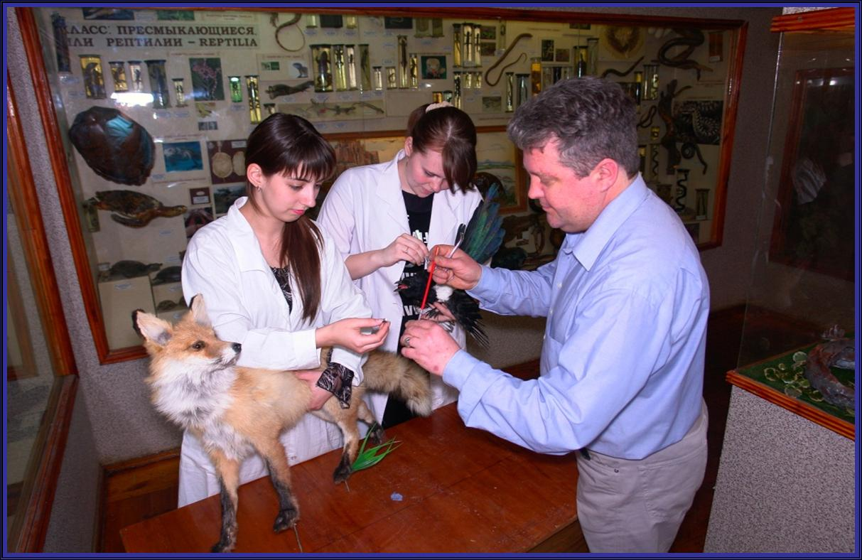 Работа с экспонатами